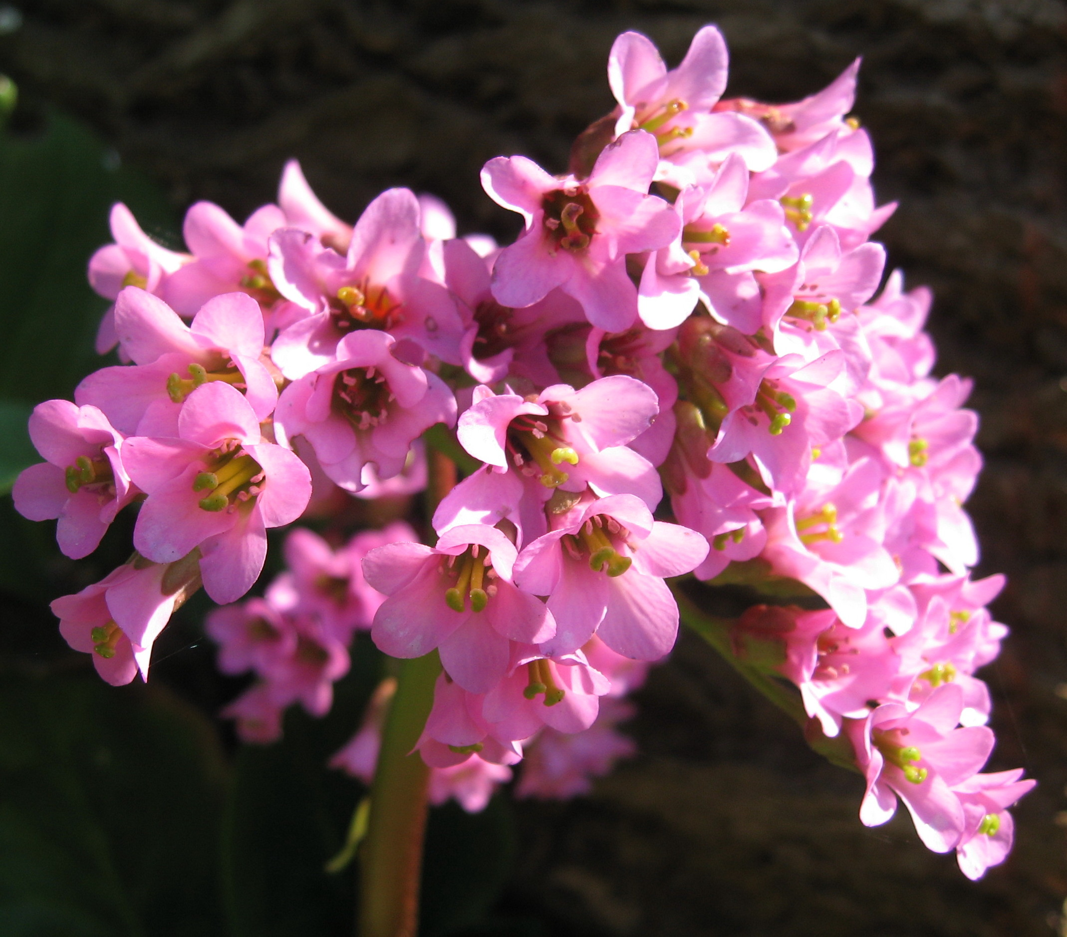 schoenlappersplant ofwel bergenia